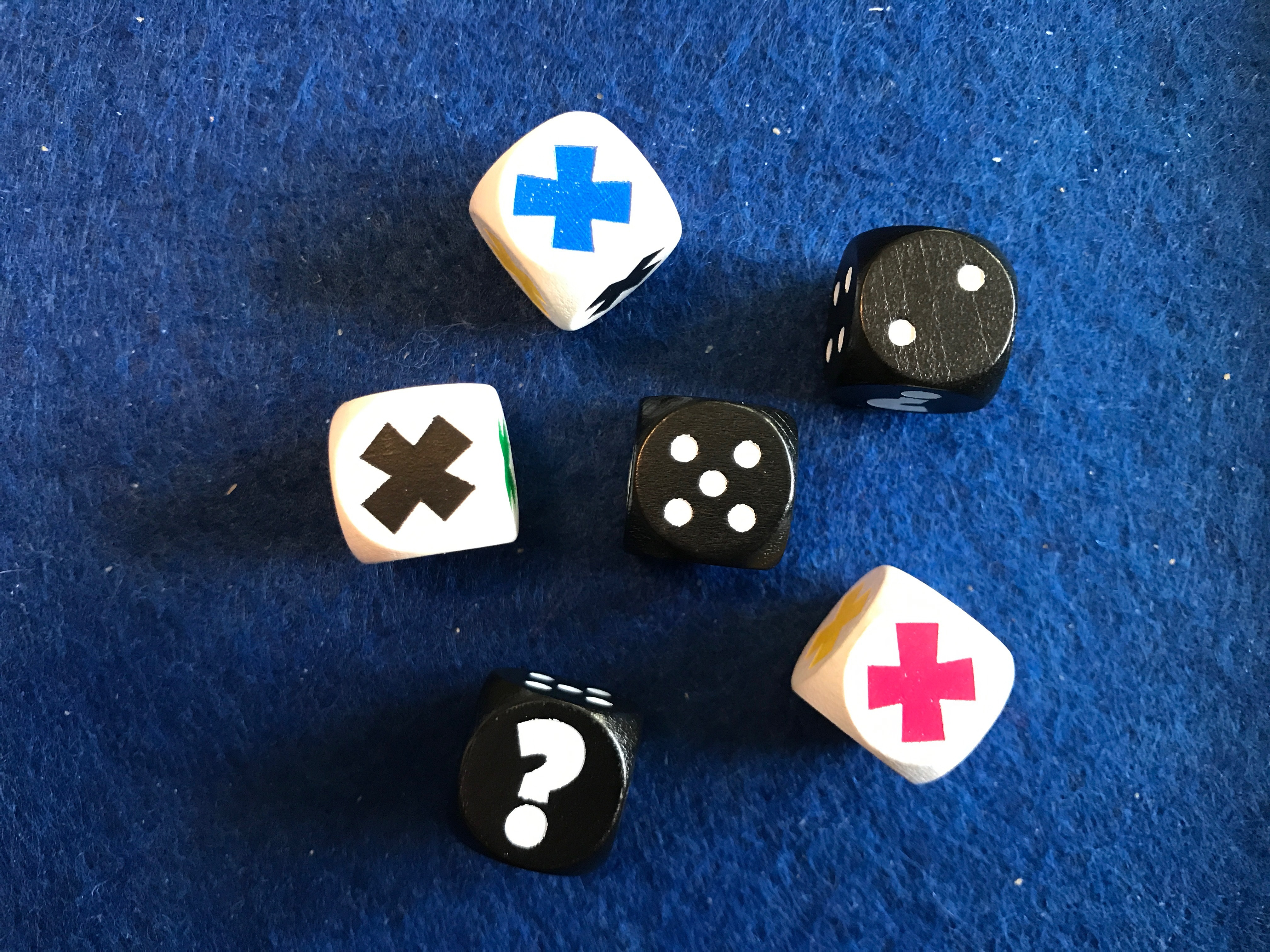 Spielmaterial zum Spiel Noch mal!